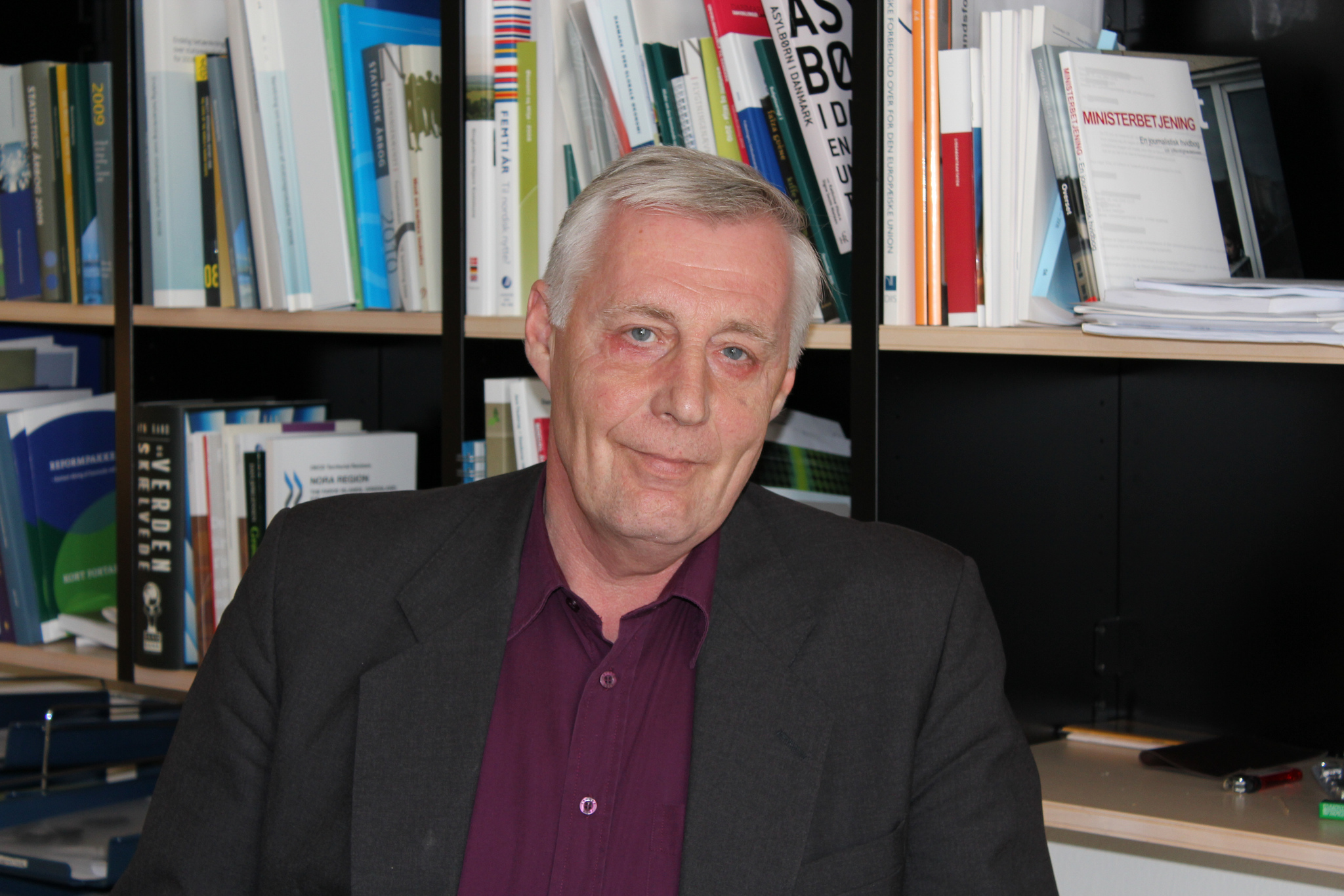 Transportminister Henrik Dam Kristensen på sit kontor.